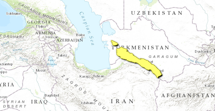 Mappa Ecoregione PA1008 - Steppa alberata e boscaglie del Kopet Dag